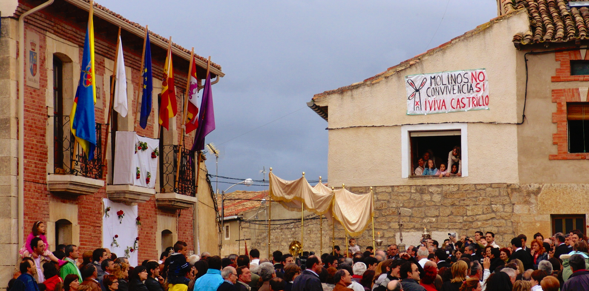 Paso procesión Corpus Christi frente casa consistorial, Castrillo de Murcia, arquitectura popular, piedra de sillería y adobe, Sasamón, Burgos, España.